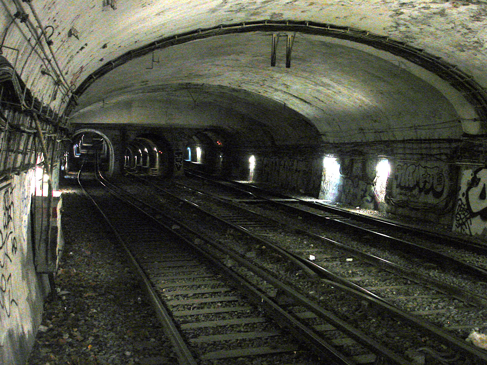 Station Cluny - La Sorbonne de la ligne 10 du métro de Paris, France. Le tunnel en direction d'Odéon, avec le raccordement central vers la ligne 4.